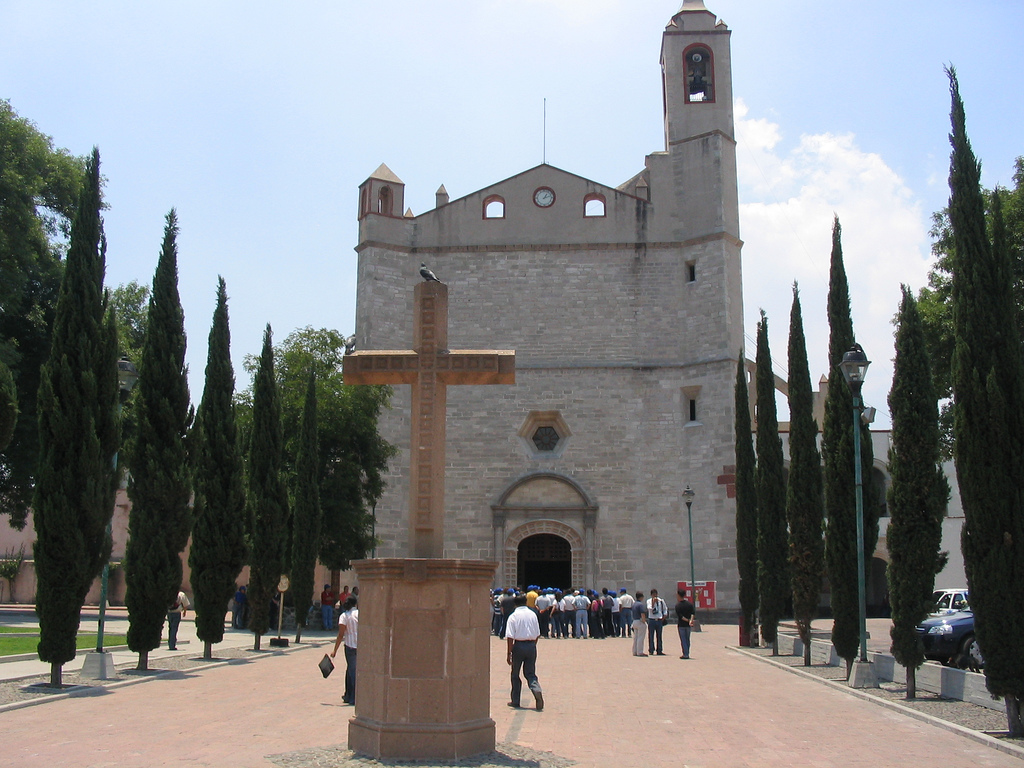 Catedral de Tula de Allende